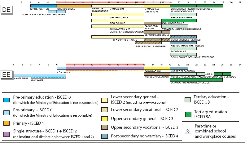 Haridusüsteemide võrdlus: Eesti ja Saksamaa ISCED astmete järgi